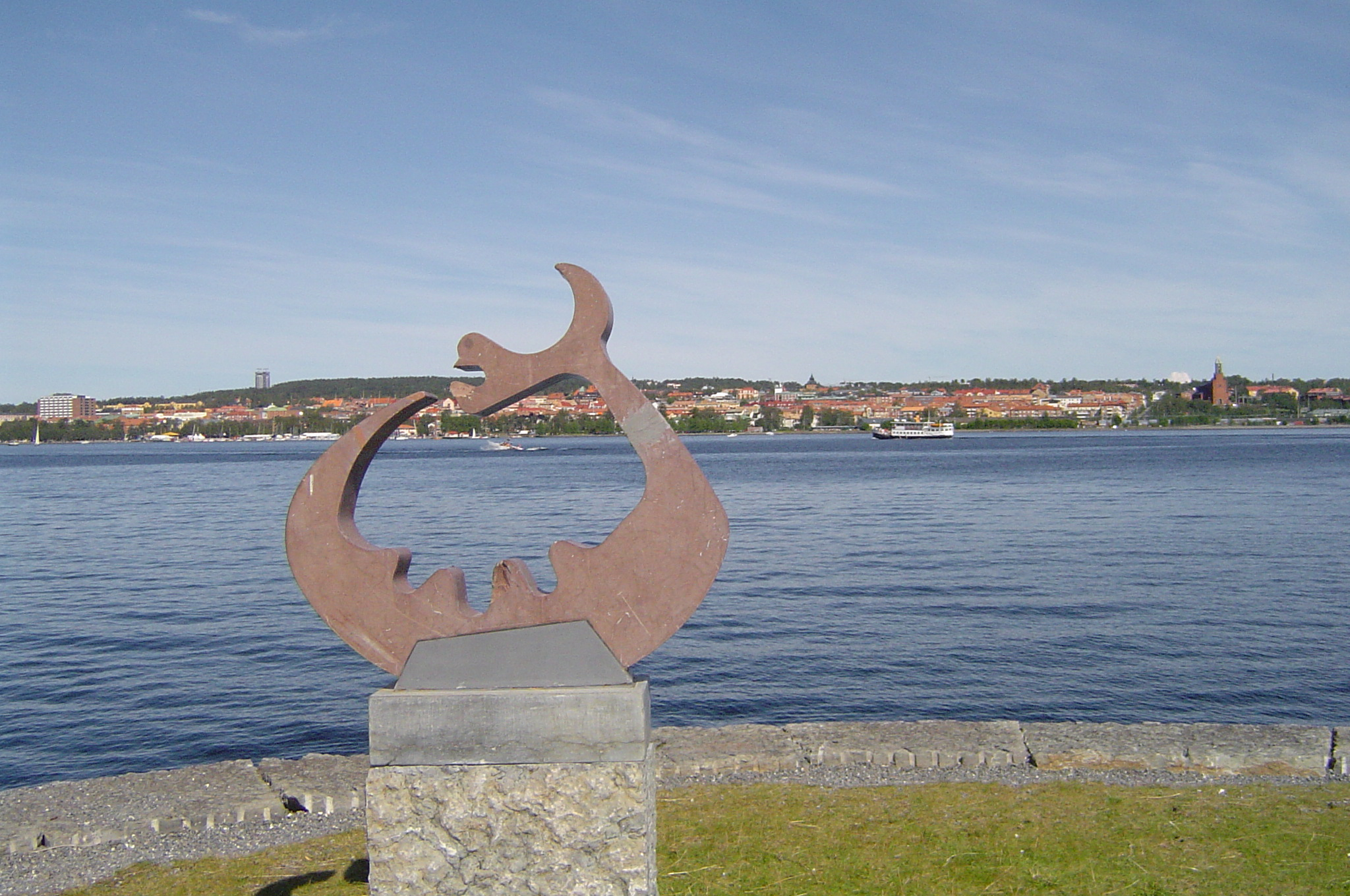 De draak van het Storsjön met de stad Östersund op de achtergond. Foto dateert van 22 juli 2006